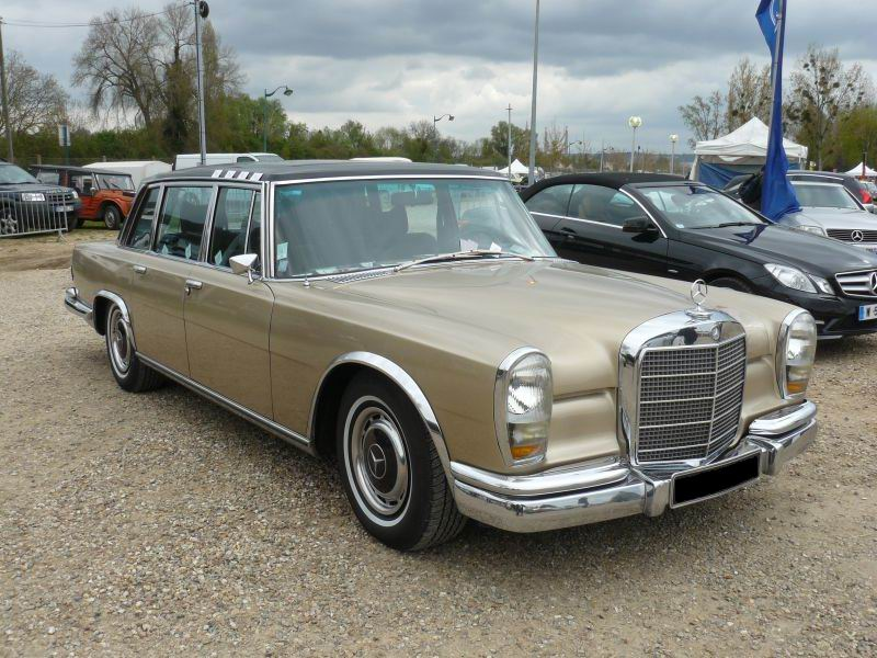 Mantes la Jolie 2012